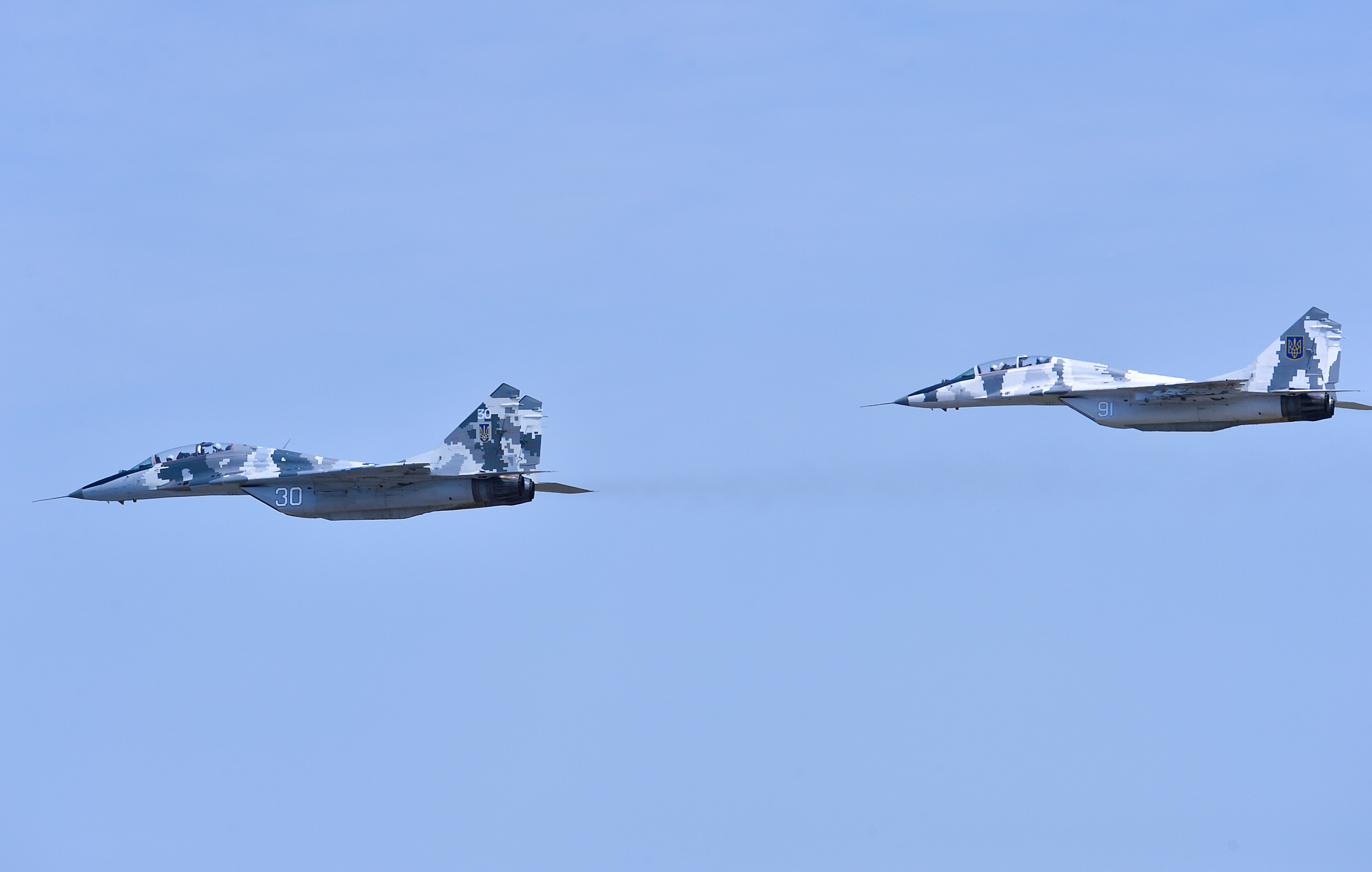 Участь Президента в урочистих заходах з нагоди Дня Повітряних Сил Збройних Сил України